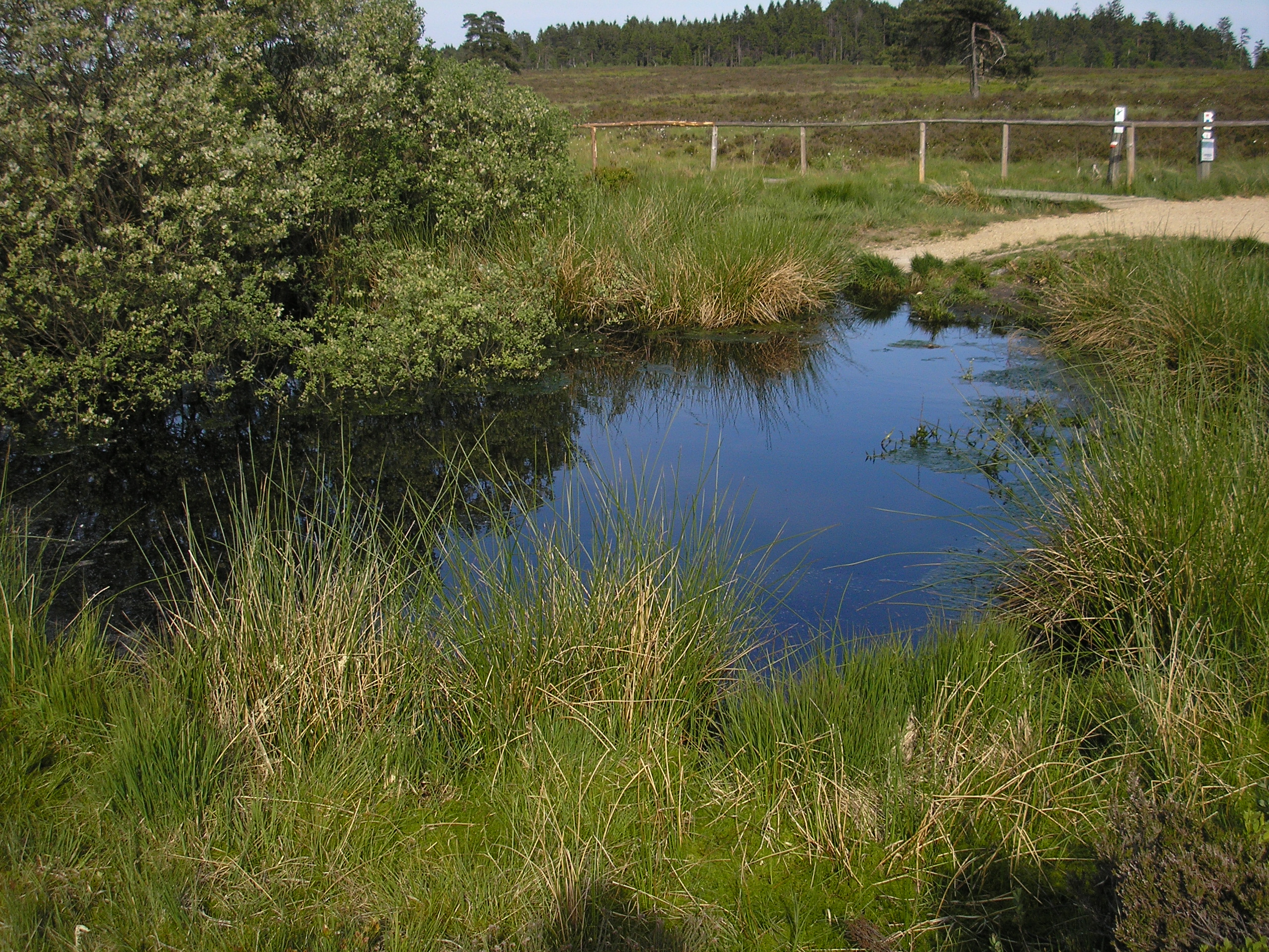 Fagne de Malchamps, Spa-Berinzenne, East Belgium